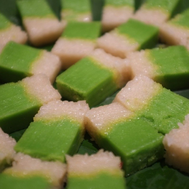 Seri Muka in Malaysia